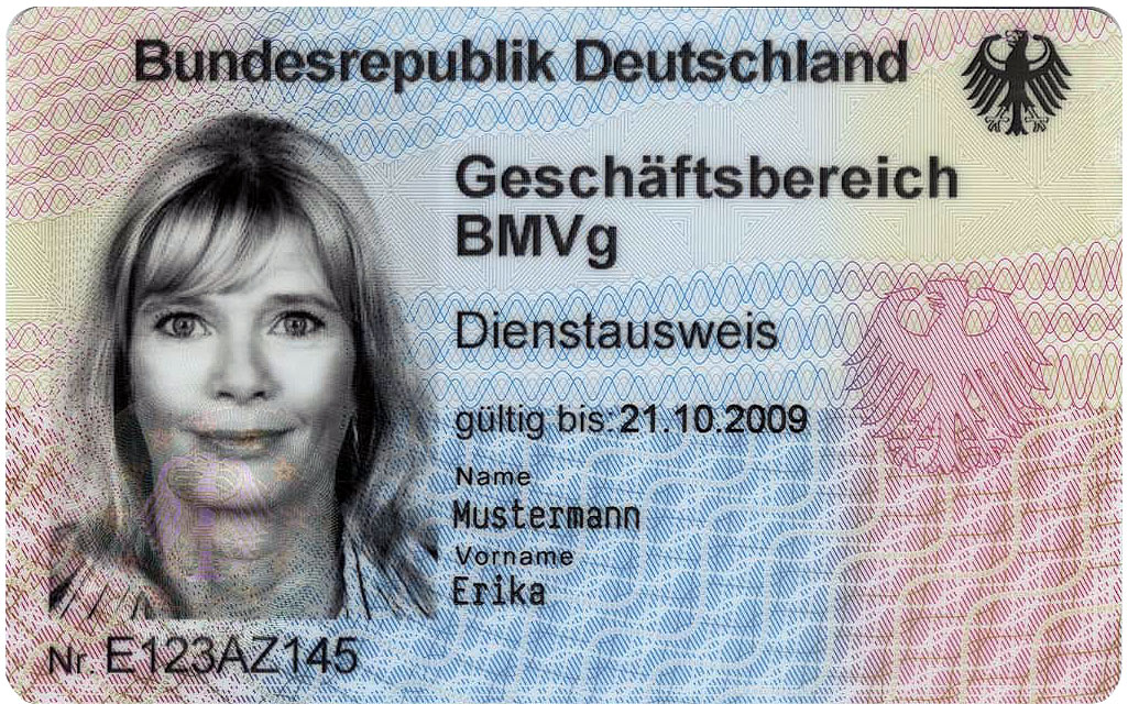 Elektronischer Dienstausweis für deutsche Bundesbehörden (eDA), Dienstausweis Geschäftsbereich des Bundesministeriums der Verteidigung (BMVg), Vorderseite